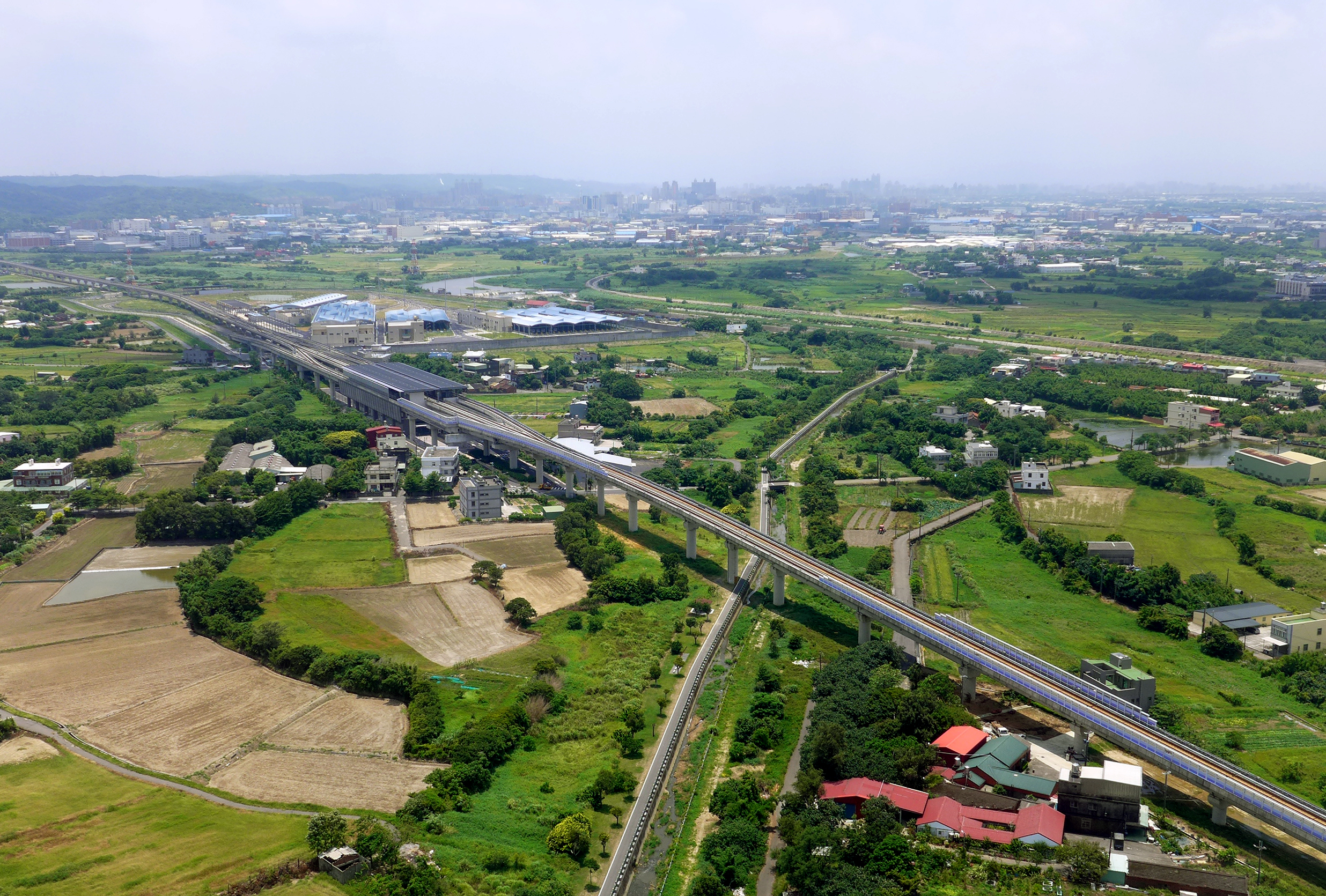 Luzhu District